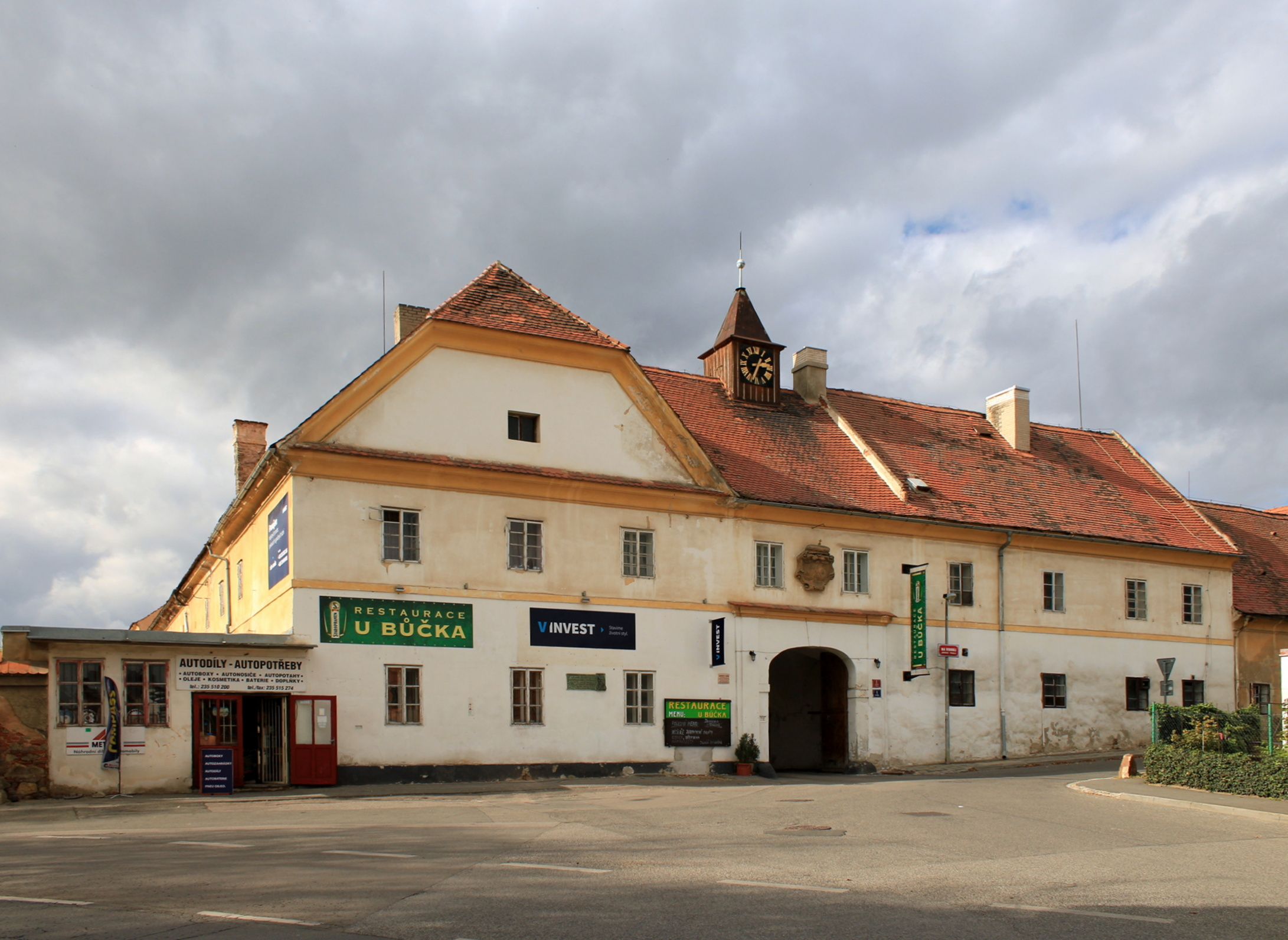 Jinonický schwarzenberský zámek